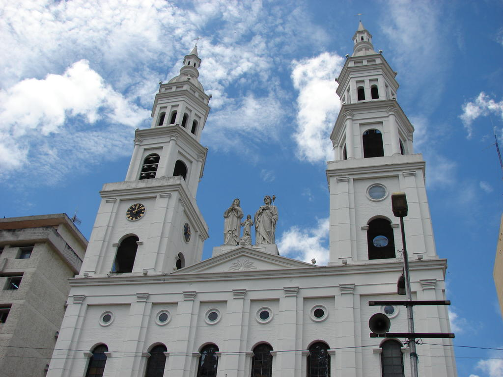 Catedral de Bucaramanga (Colombia)